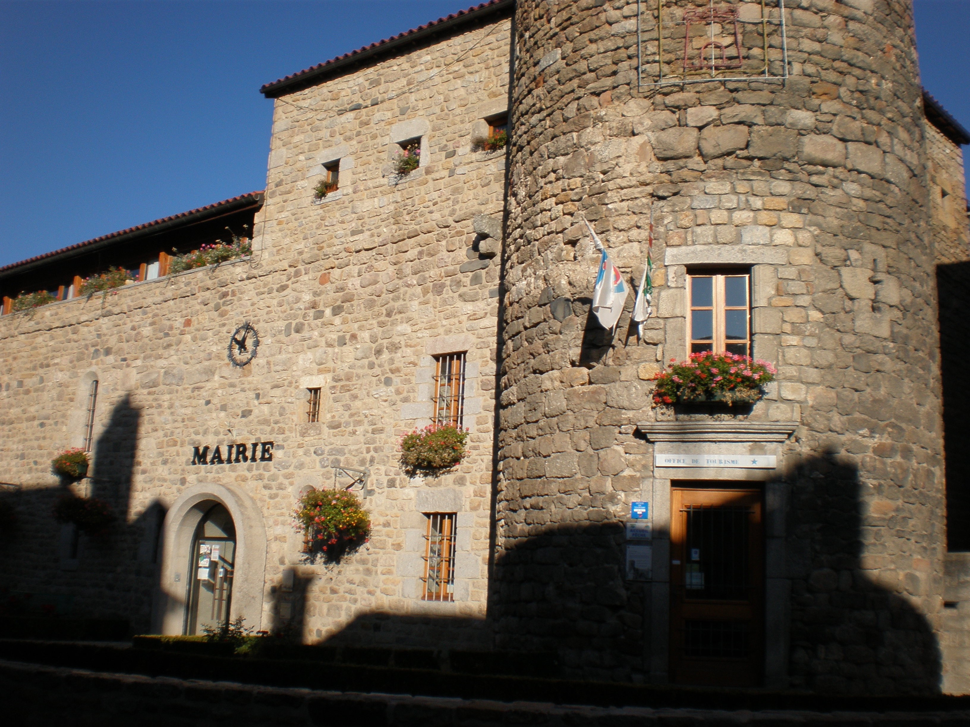 Le Malzieu-Ville (Lozère) : la mairie